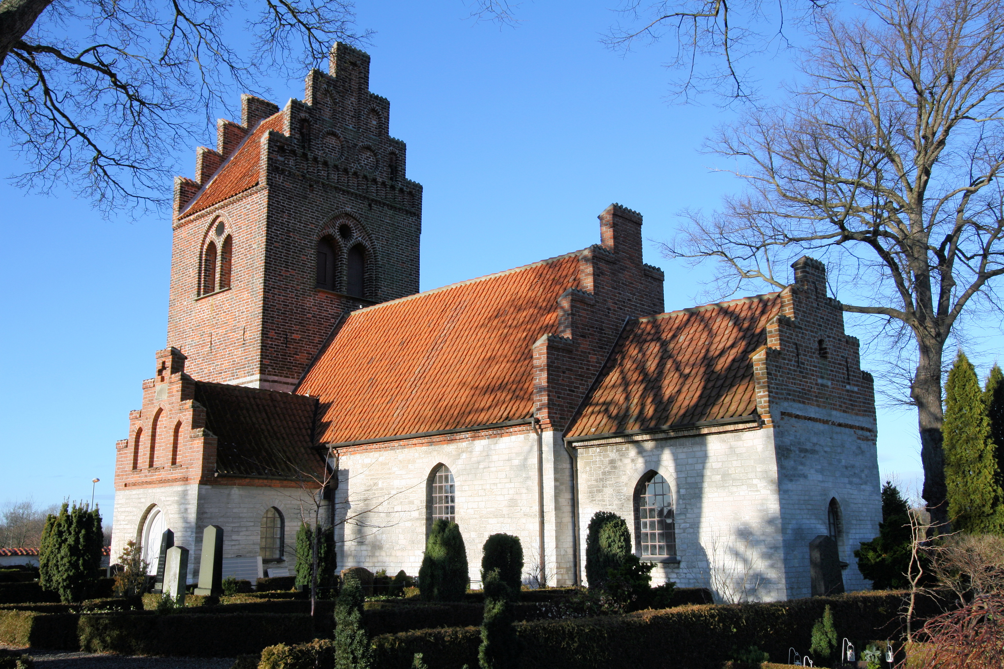 Vallensbæk Kirke, Vallensbæk, Denmark Vallensbæk Kirke